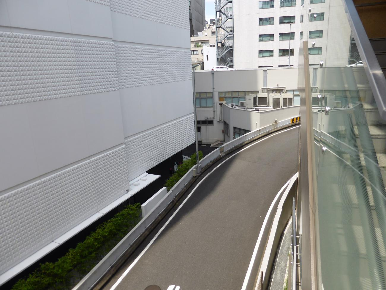 水谷橋公園の階段から東銀座出口を望む